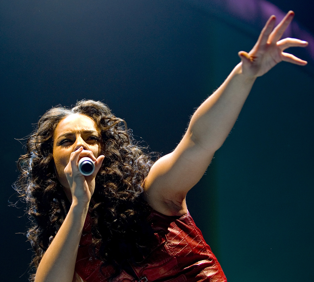 Alicia Keys